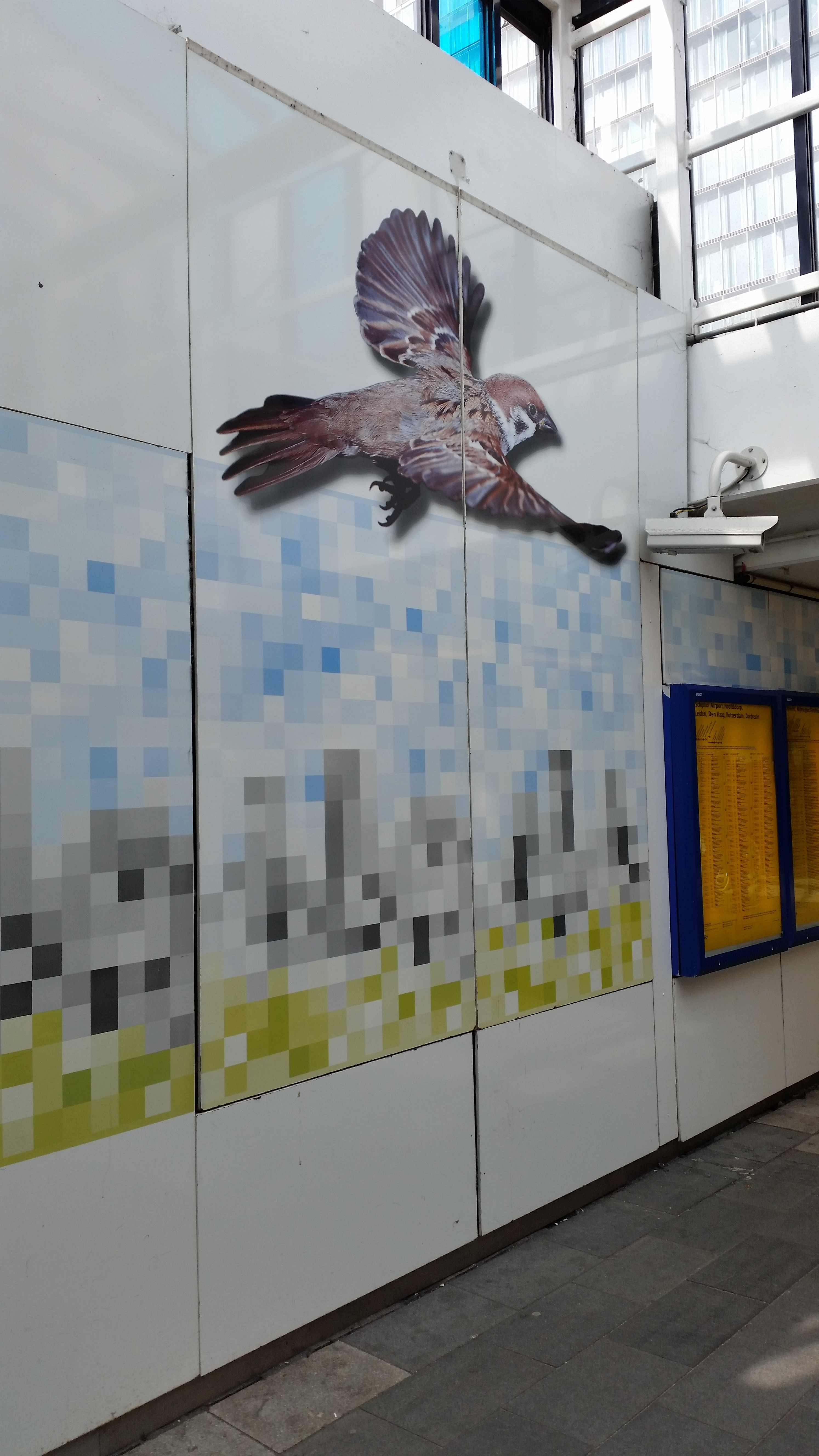 Kunstwerk met vogel in Minervapassage